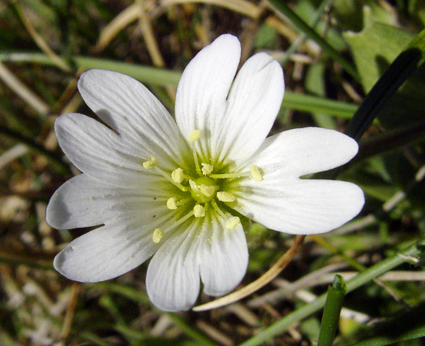 eigen foto 2e paasdag scheveningse duinen